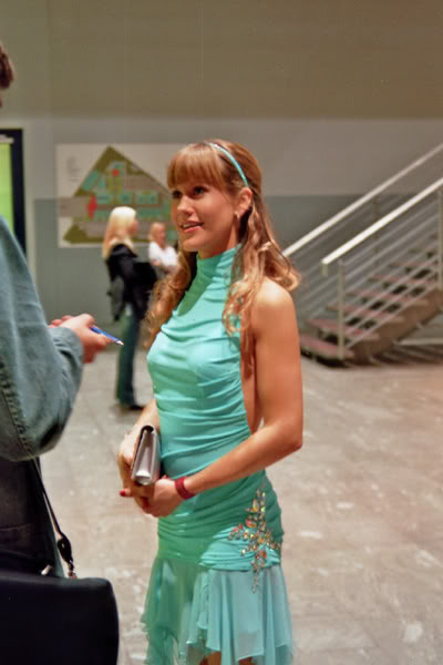 Wolke Hegenbarth beim Deutschen Comedypreis